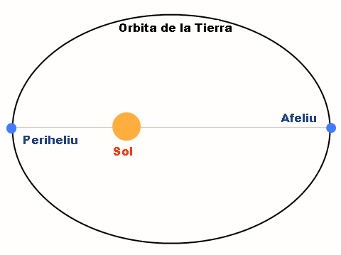 Afeliu Periheliu